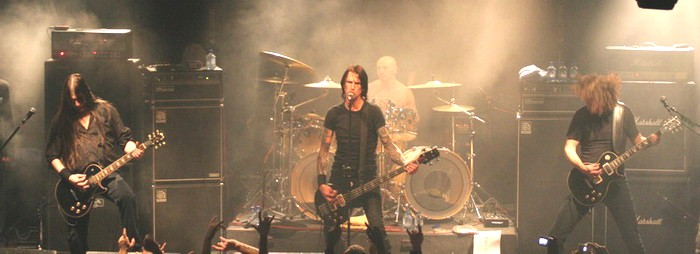 Gorefest, Концерт в Москве, 2007-12-01